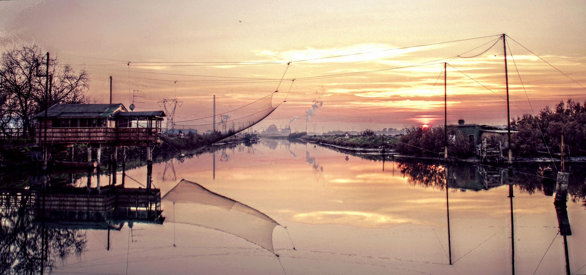 Marina Romea, Ravenna, Italia